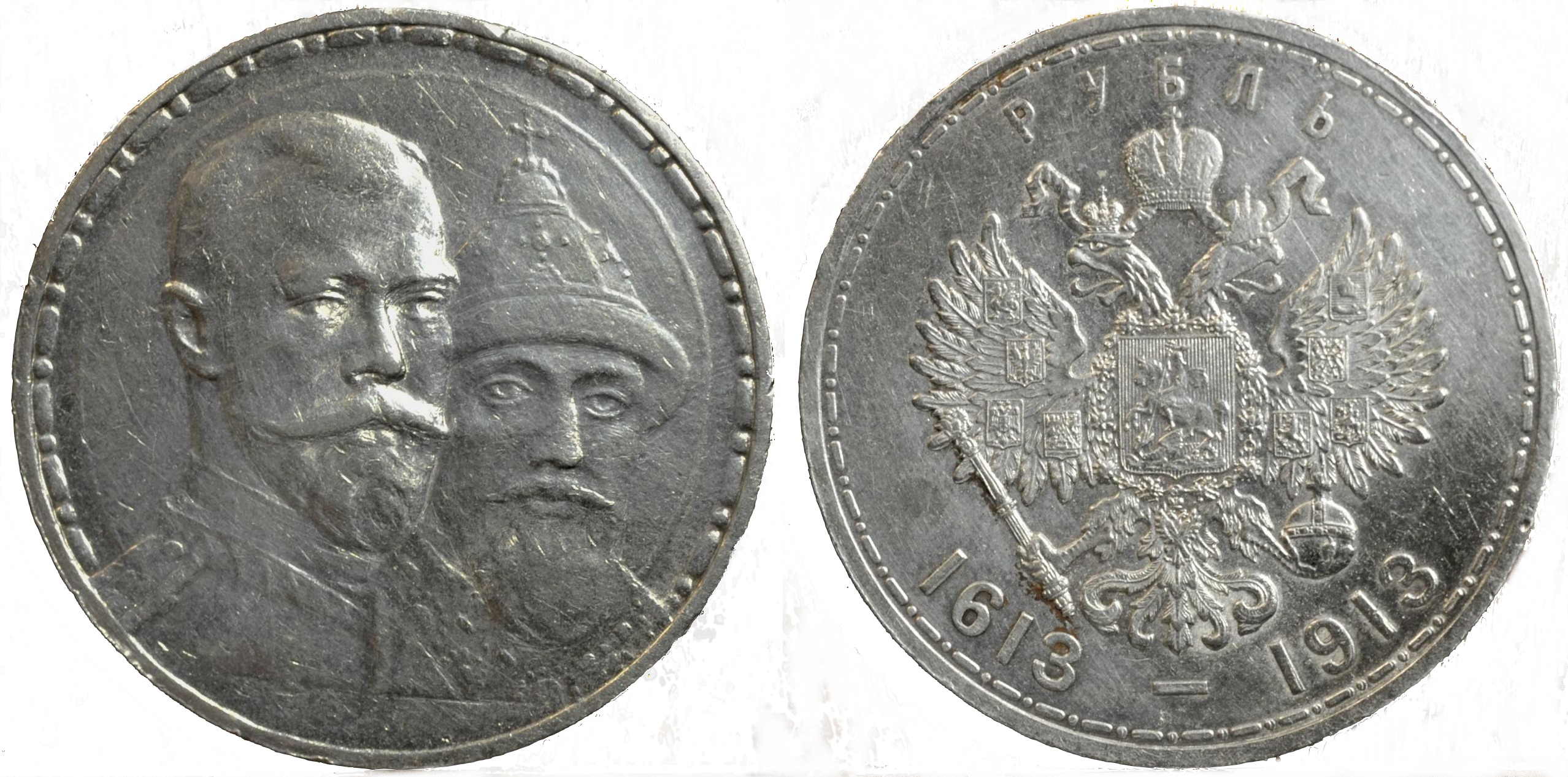 Юбилейный рубль Николая 2 1913 300 лет дома Романовых аверс и реверс, серебро. Выпуклый чекан. Тираж 1450000, автор барельефа на аверсе - скульптор Керзин М. А.